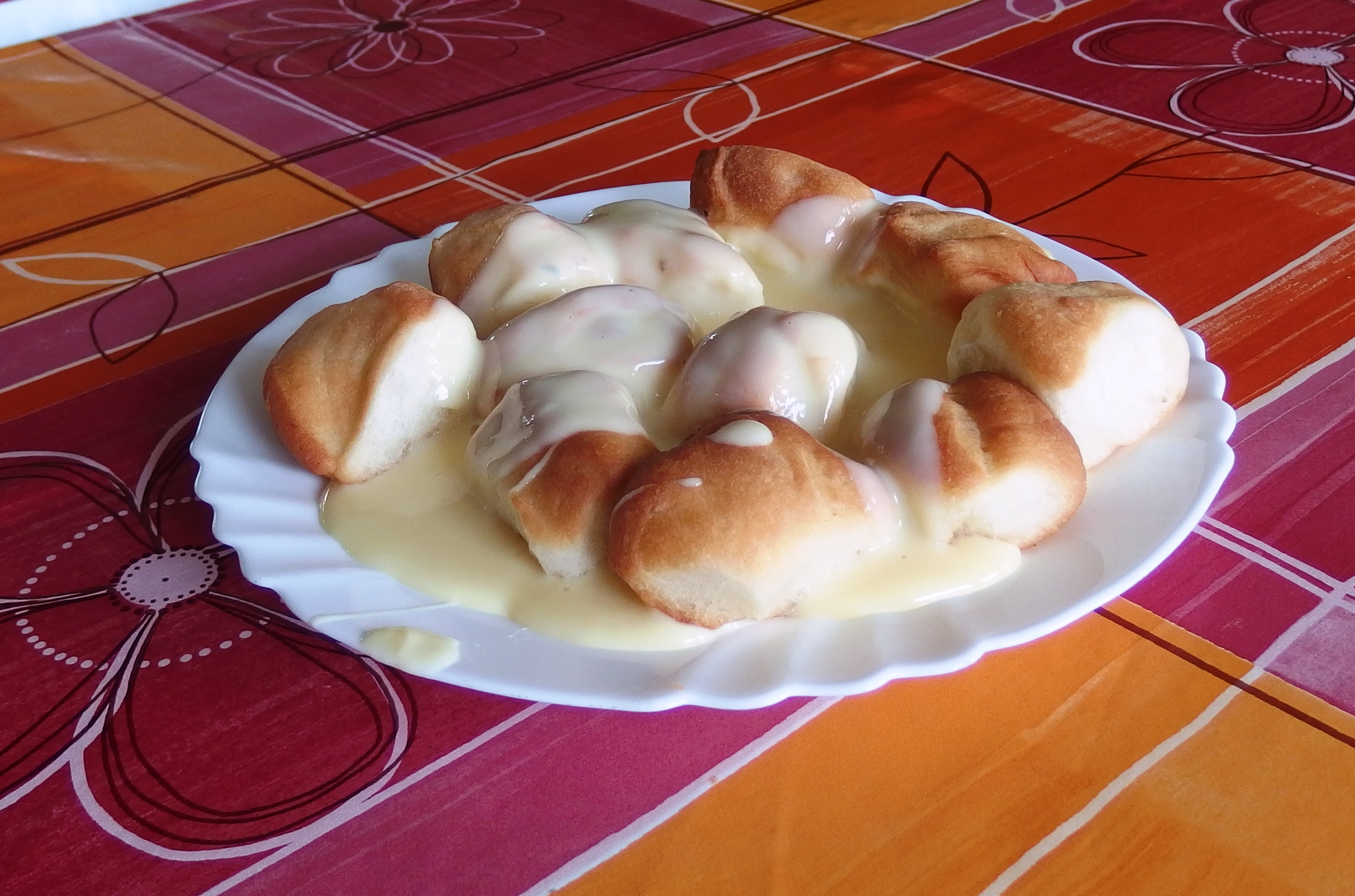 Buchtičky s krémem